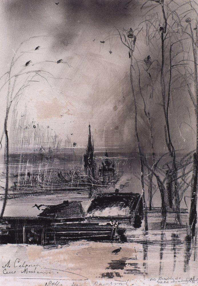 "Грачи прилетели. Пейзаж с церковью". 1894. Эскиз. Бумага грунтованная, тонированная, проскребание, итальянский карандаш. 33х23 см. Государственная Третьяковская галерея